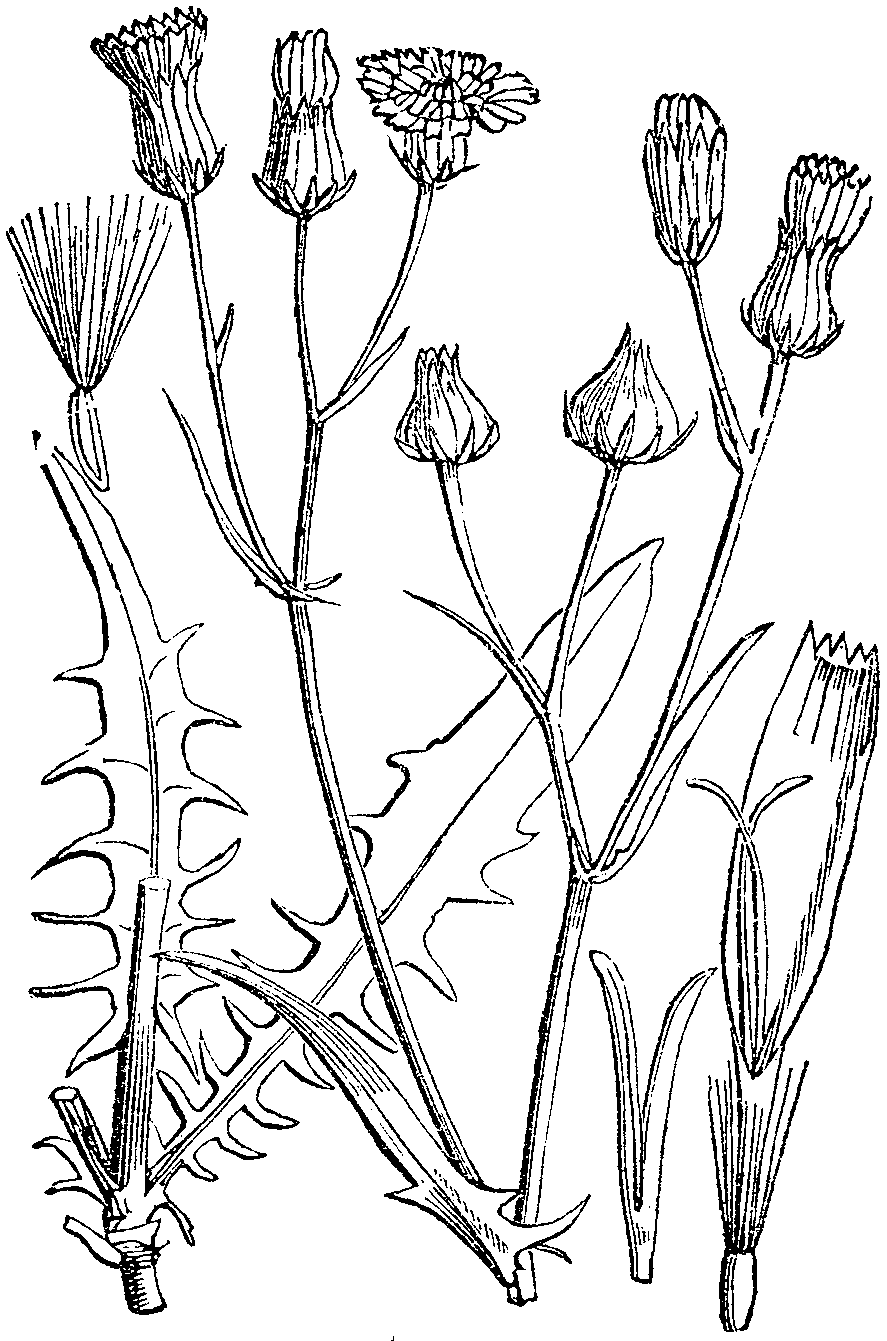 Slika, 440. Zeleni dimek. (Crépis vírens.) [sic!]